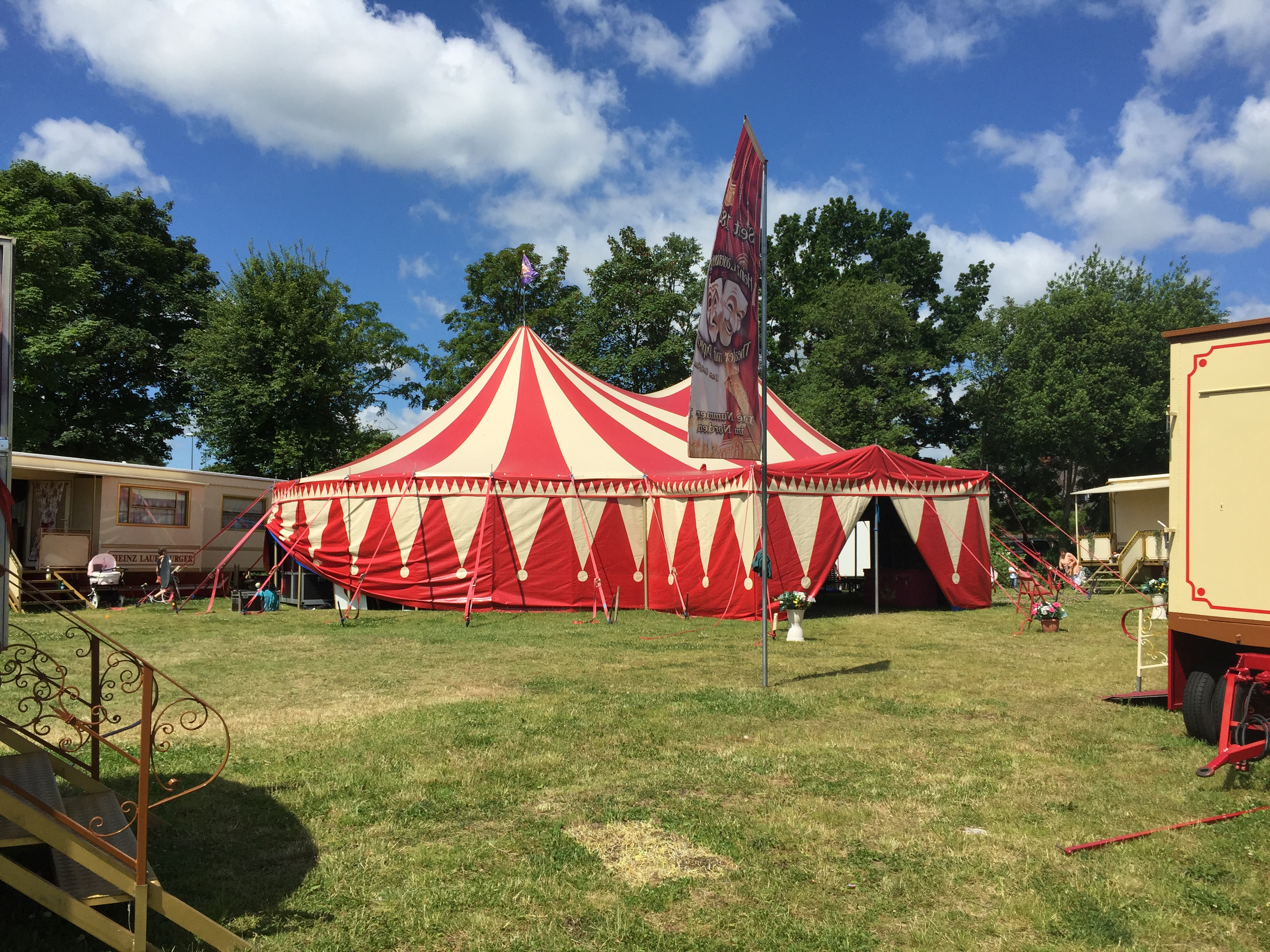 Zirkuszelt eines Familienbetriebes